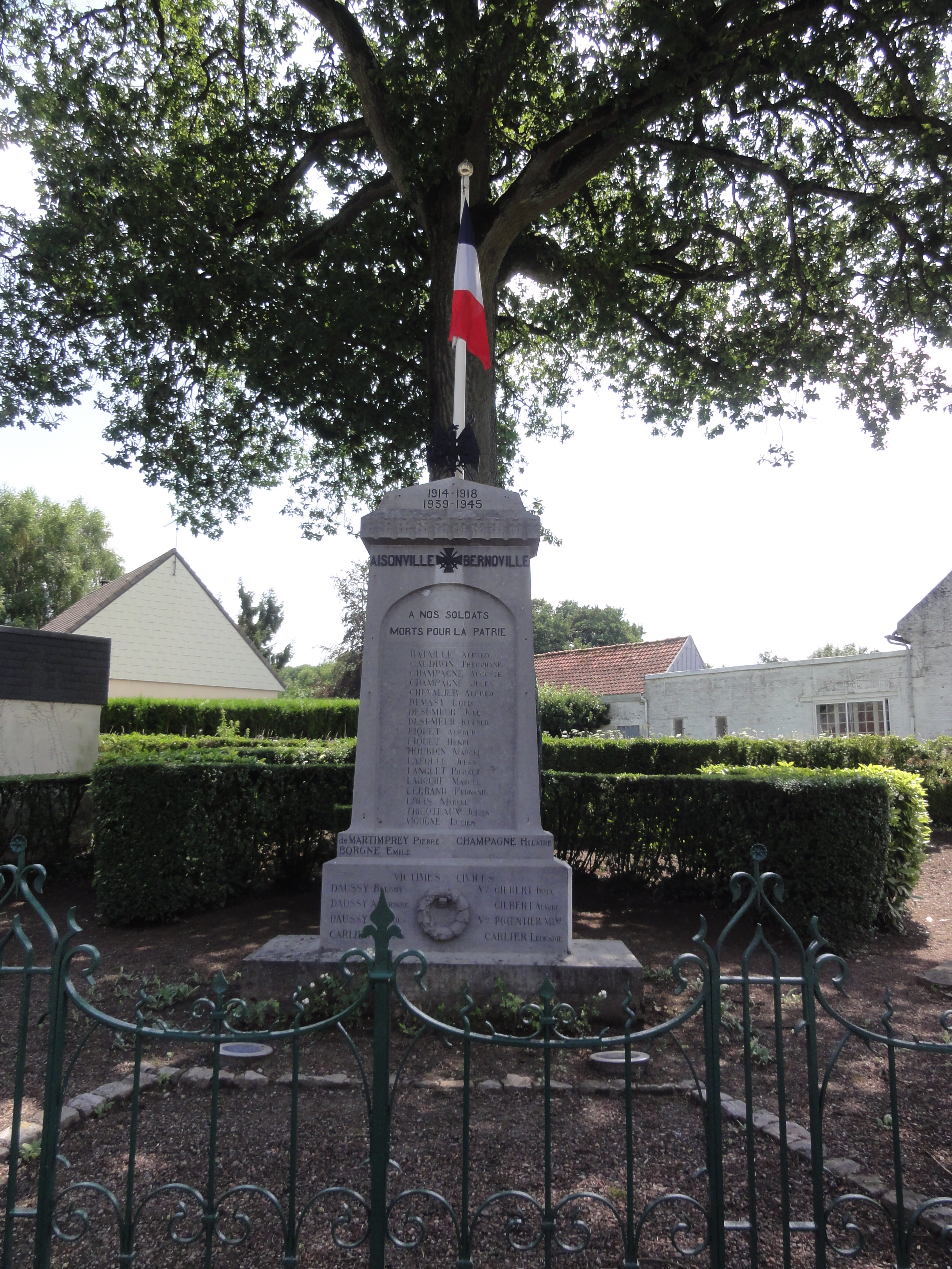 Aisonville-et-Bernoville (Aisne) monument aux morts